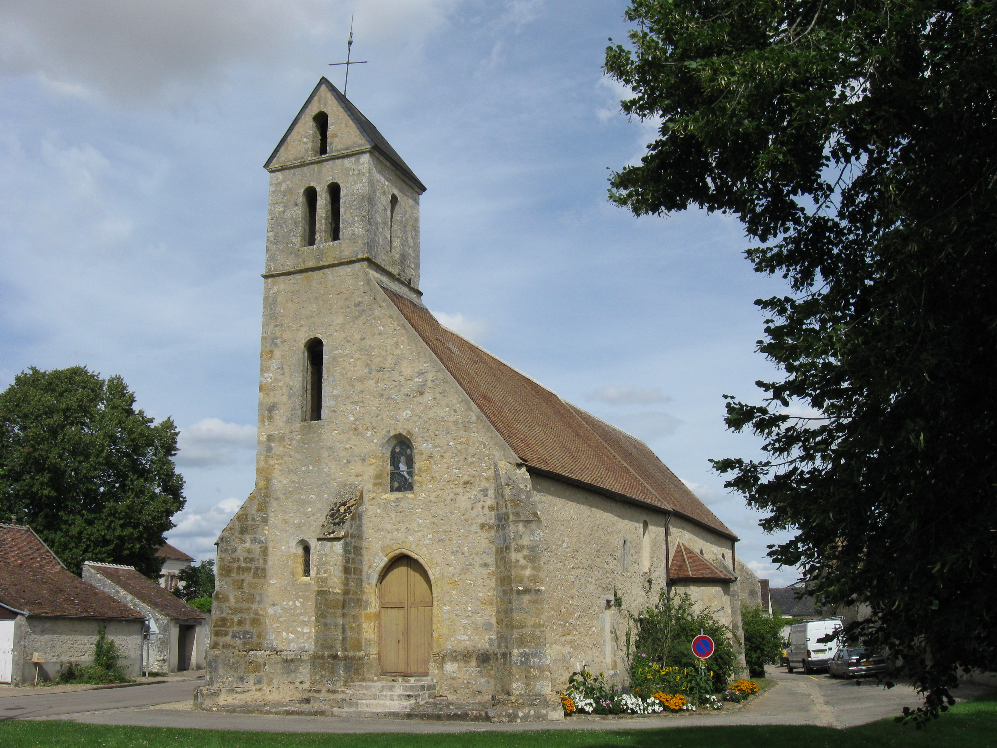 Église Notre-Dame-de-l’Assomption. (Gironville, département de la Seine-et-Marne, région Île-de-France).